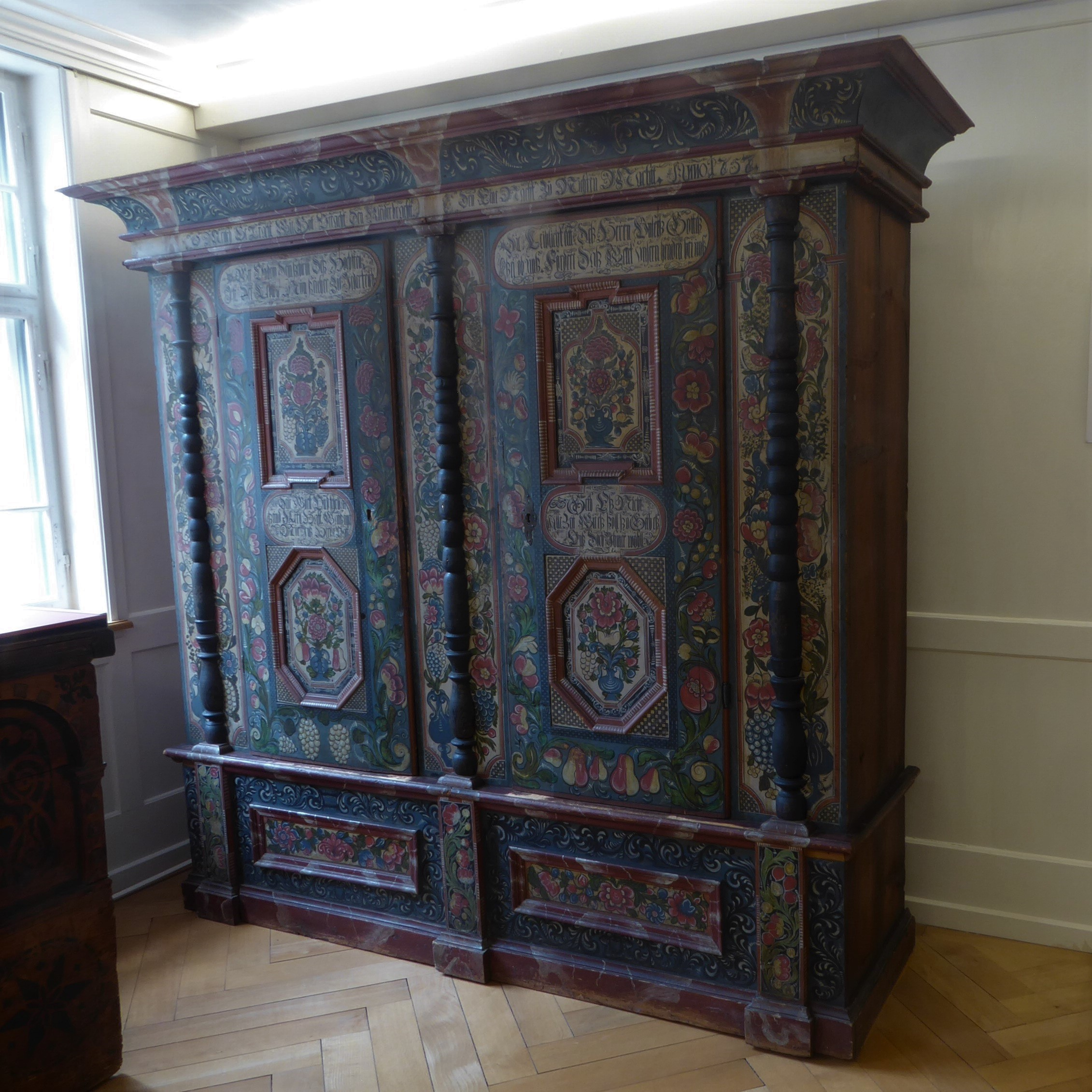 Doppeltüriger Barockkasten vom Maler der frommen Sinnsprüche im Toggenburger Museum Lichtensteig, 1757